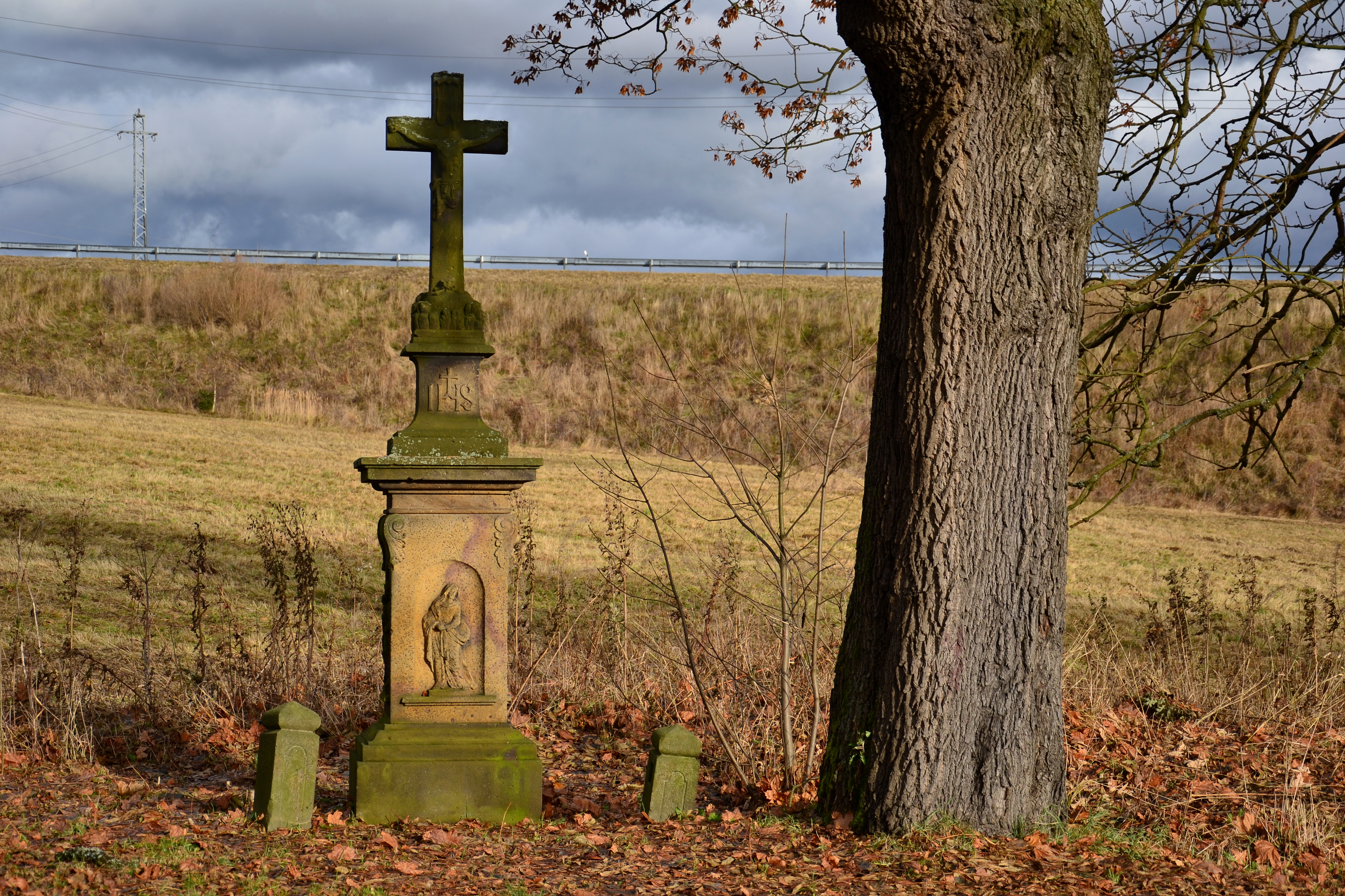 Kříž z doby okolo roku 1700 u silnice ve východní části vesnice